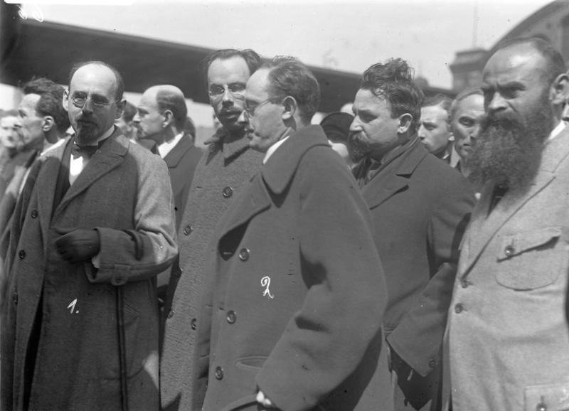 Die Schweiz verweigert dem bekannten russischen Journalisten Radek der Moskauer Istwestija die Einreise zur Abrüstungs-Conferenz in Genf ! Dem auch in Deutschland bekannte russische Journalisten Radek (Mitte), der als Vertreter seines Blattes an der Genfer Conferenz teilnehmen wollte, wurde unter Hinweis auf gewisse Vorgänge, die sich während der Anwesenheit Radeks in der Schweiz im Jahre 1921 abgespielt haben, die Einreise verboten. Information added by Wikimedia users.Officials from the Russian Embassy in Berlin, behind the coffin of Vatslav Vorovsky, who was killed on May 10, 1923.German original title: Überführung des in Lausanne ermordeten russischen Botschafters in Rom Worowski über Berlin nach Moskau. Die Mitglieder der Berliner russischen Botschaft hinter dem Sarge. (1) der russische Botschafter in Berlin Krestinsky, (2) der russische Kommunist Radek.